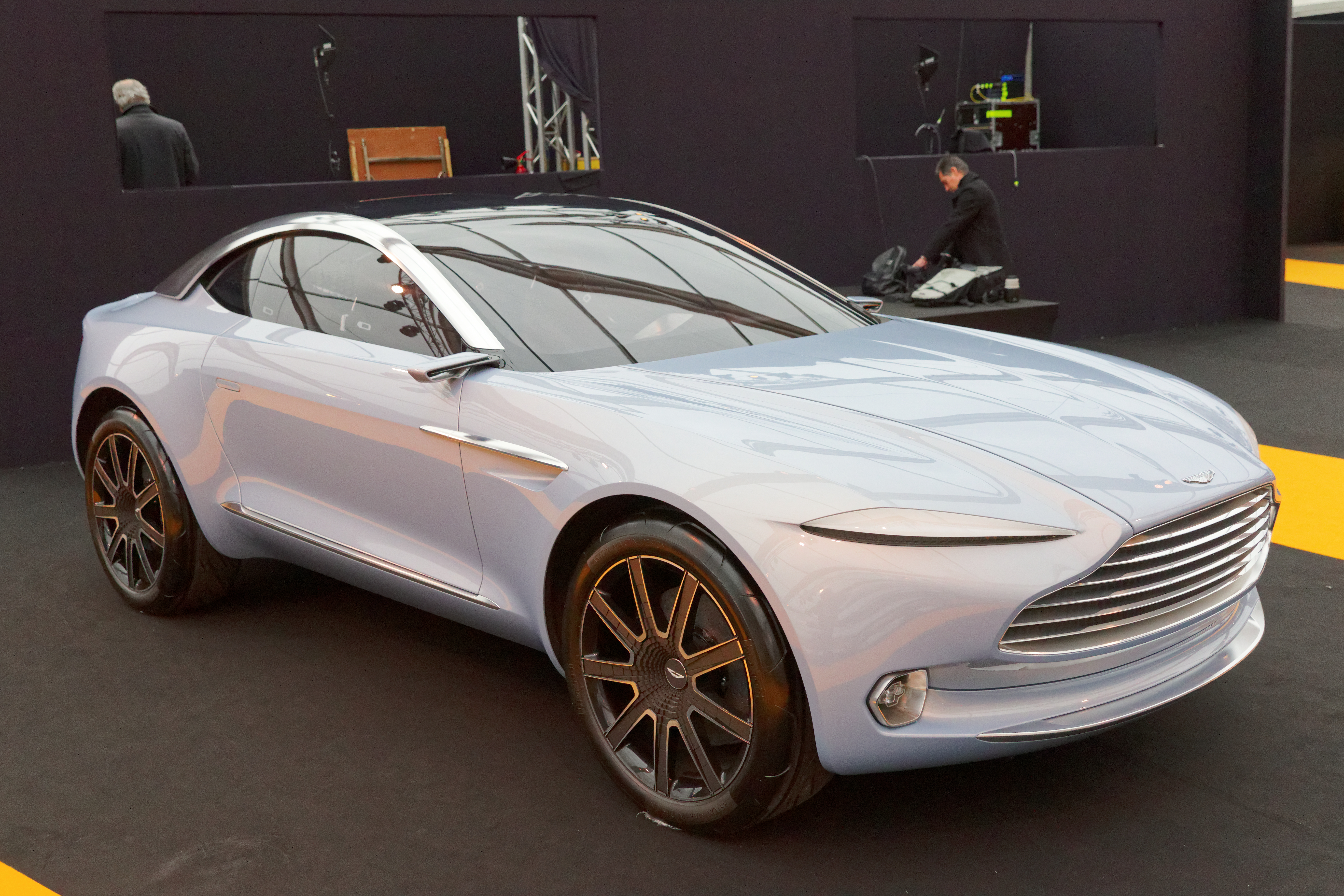 L'Aston Martin DBX exposée lors du festival automobile international 2016.